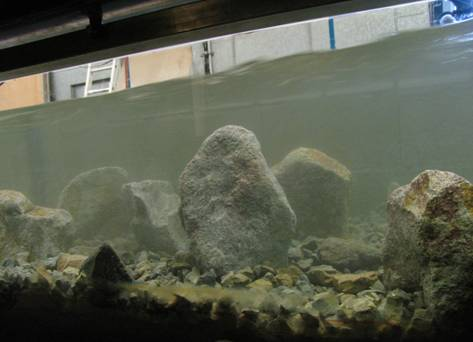 Ethohydraulik